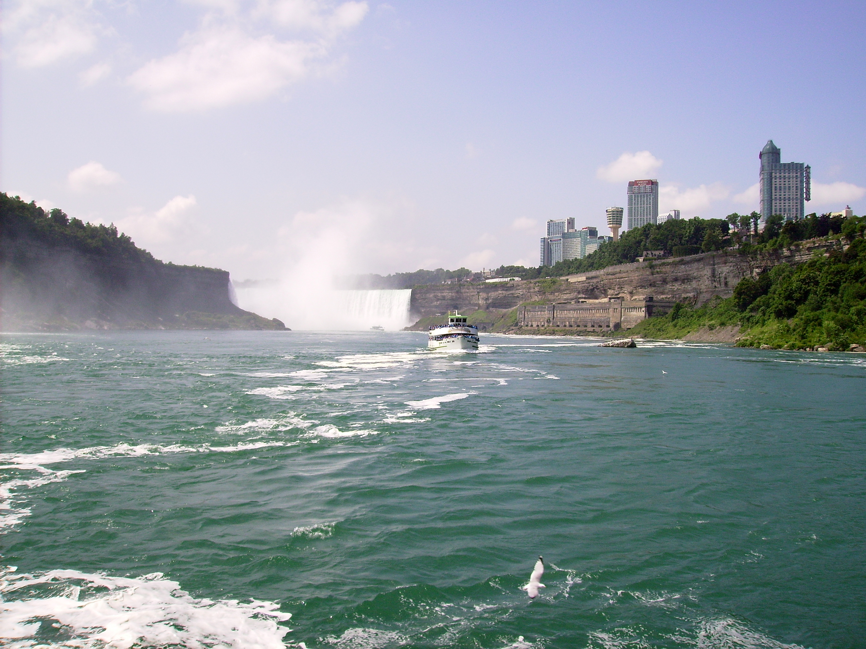 Niagara Falls